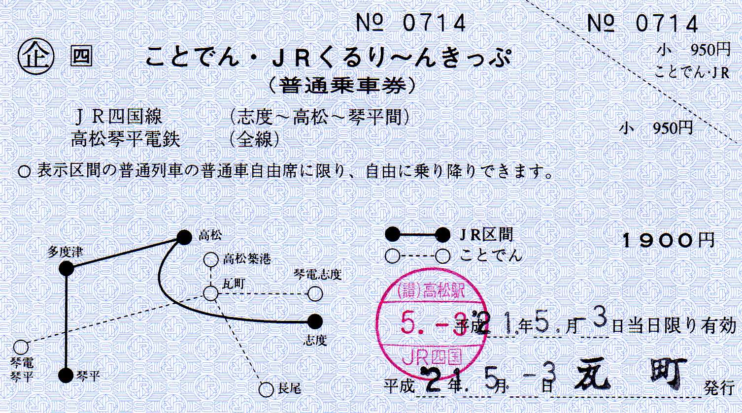 JR・ことでんくるり〜んきっぷ 常備券